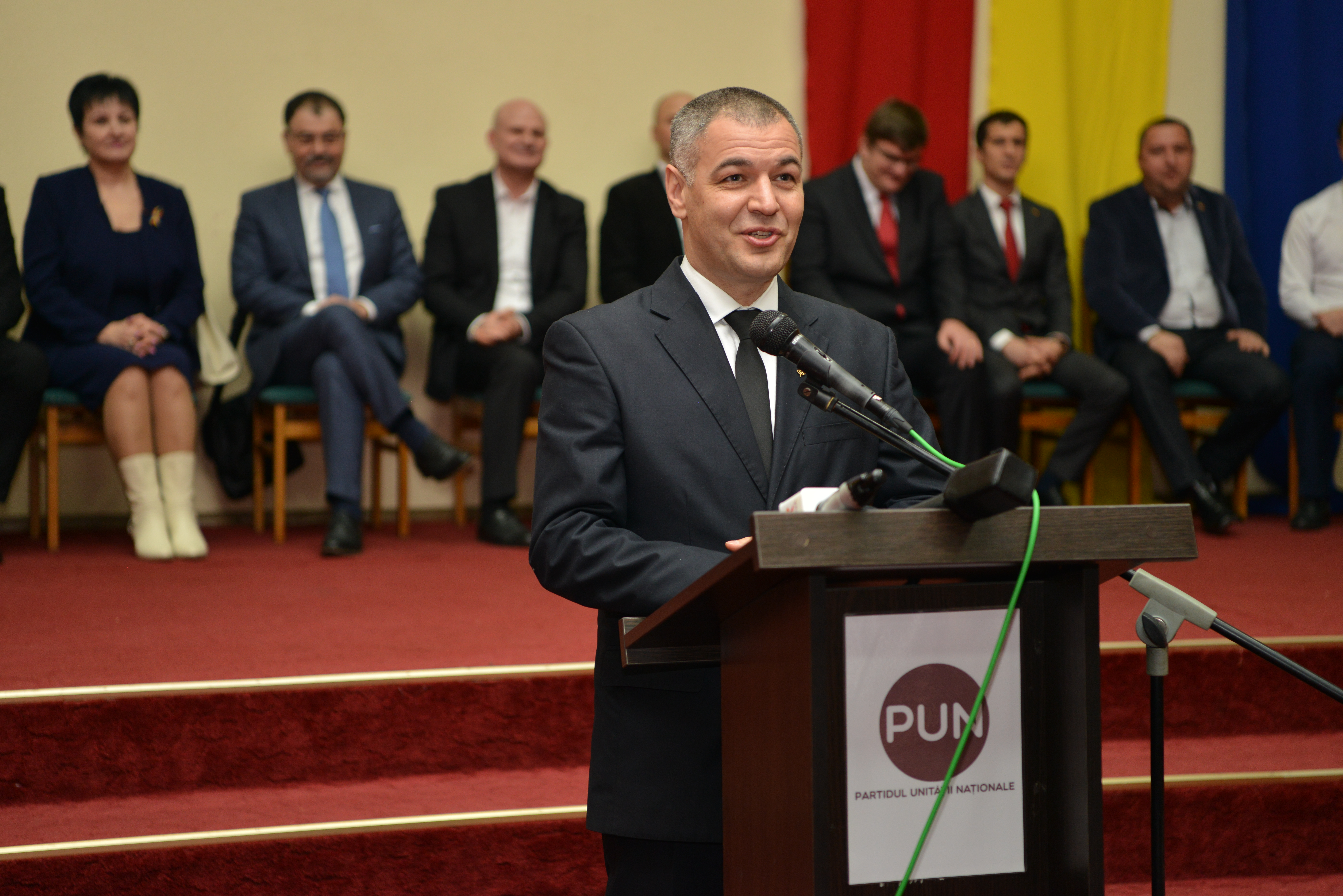 Președinte al PUN